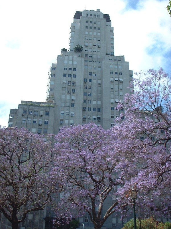 Edificio Kavanagh en Retiro, Buenos Aires. Edificio de viviendas proyectado por el Estudio Sánchez, Lagos y de la Torre, terminado hacia 1936.